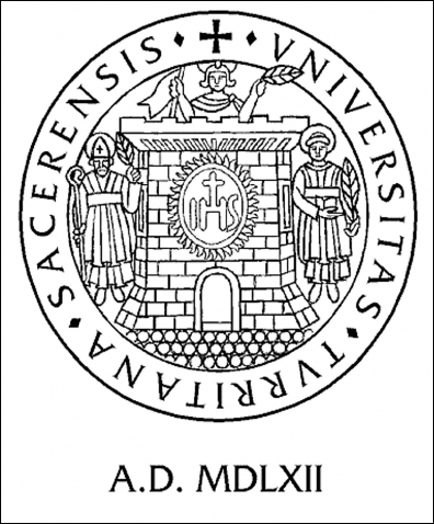 Stenma dell'Ateneo dell'Università degli Studi di Sassari